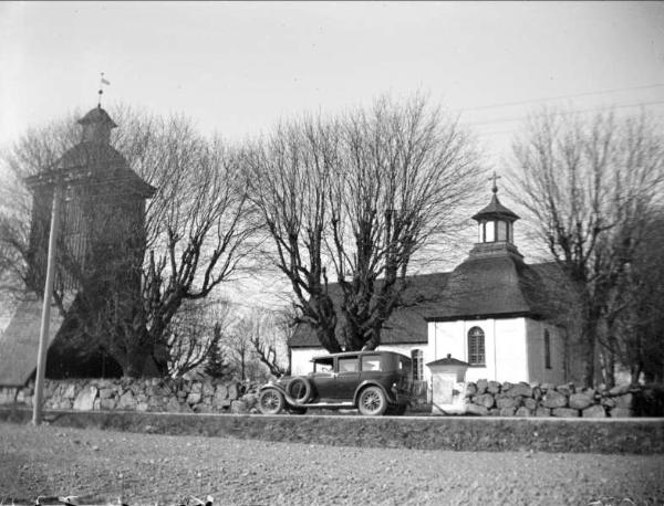 Bil på vägen framför Teda kyrka med klockstapel, Teda socken, Uppland